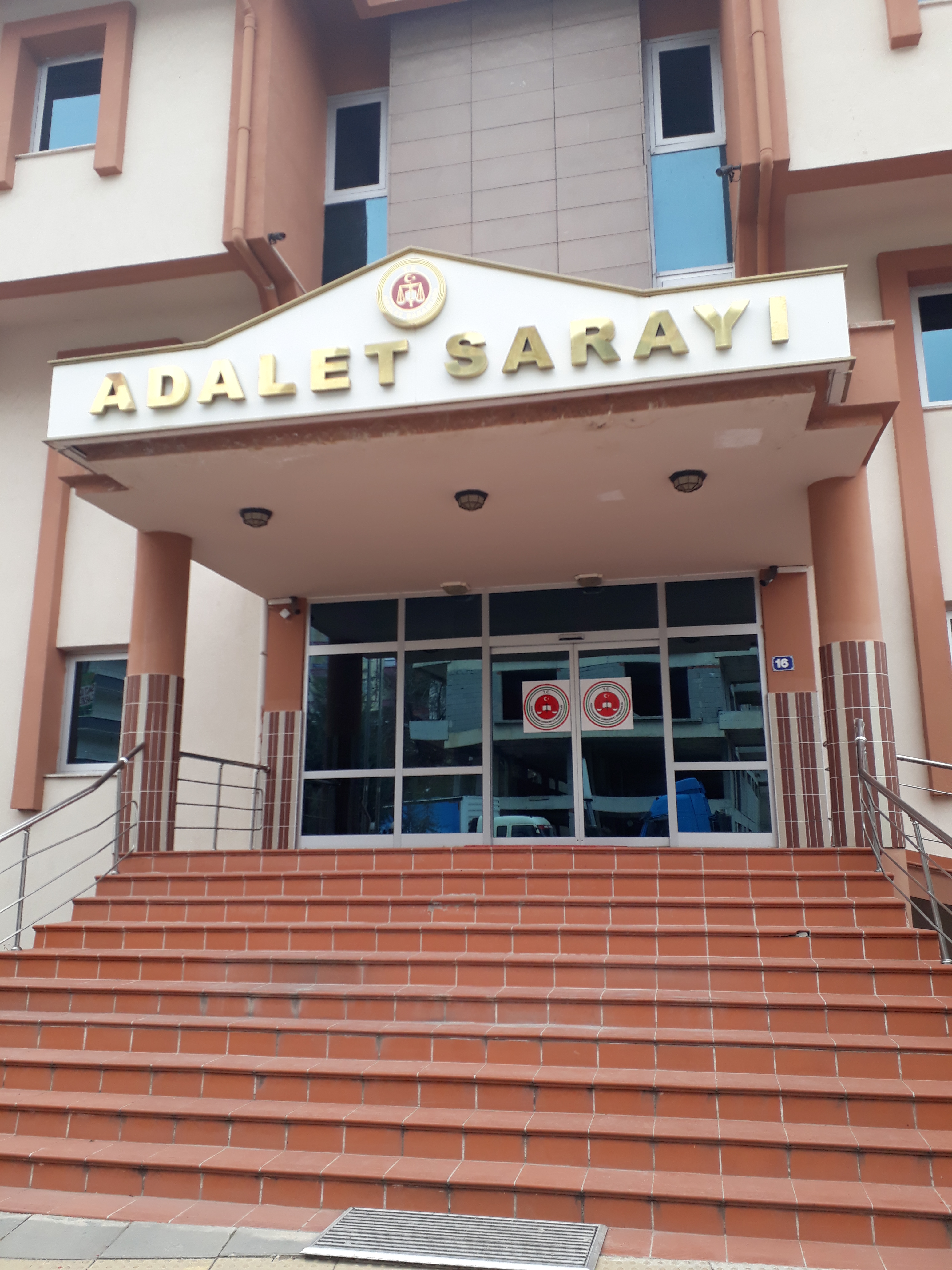 Kızılcahamam Adalet Sarayı, Kızılcahamam, Ankara, Türkiye.